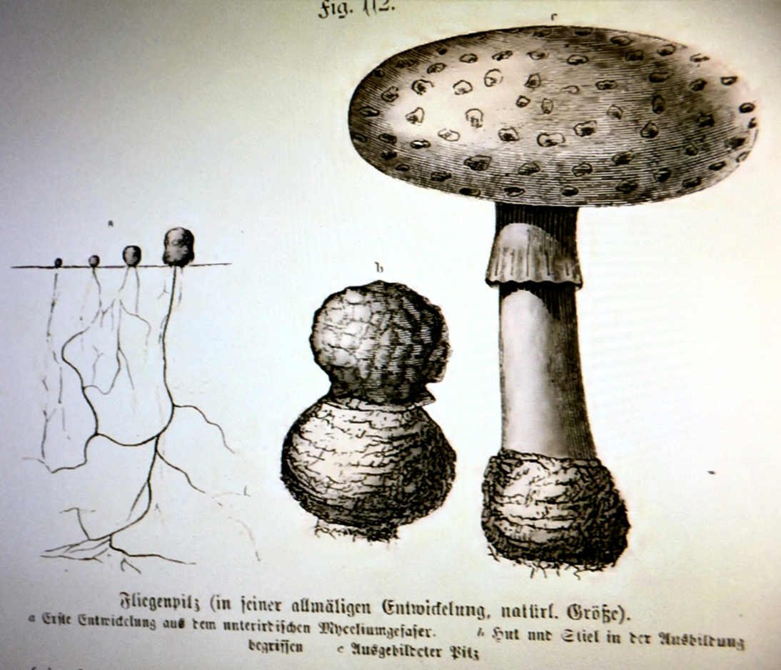 Fliegenpilz nach Paul Kummer